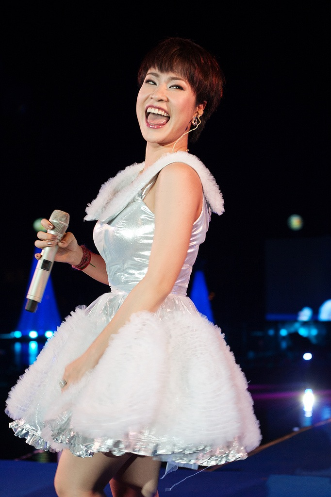 Press "F" if you like